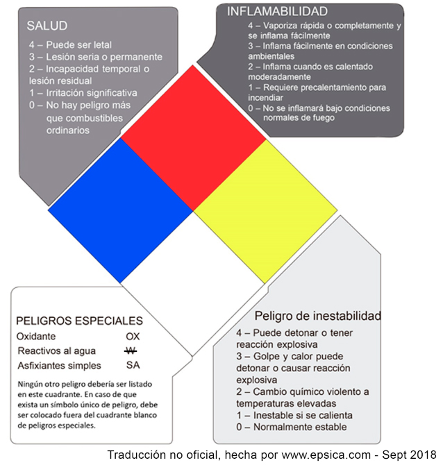 Rombo NFPA 704 según la versión 2017. Traducción no oficial por